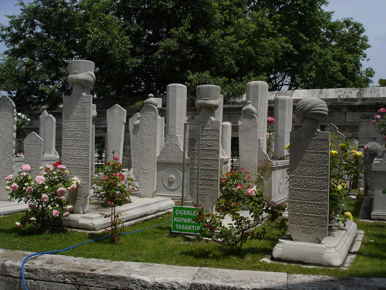 Il cimitero della Moschea di Solimano il Magnifico ad Istanbul. Foto di: Giovanni Dall'Orto, 26-5-2006.